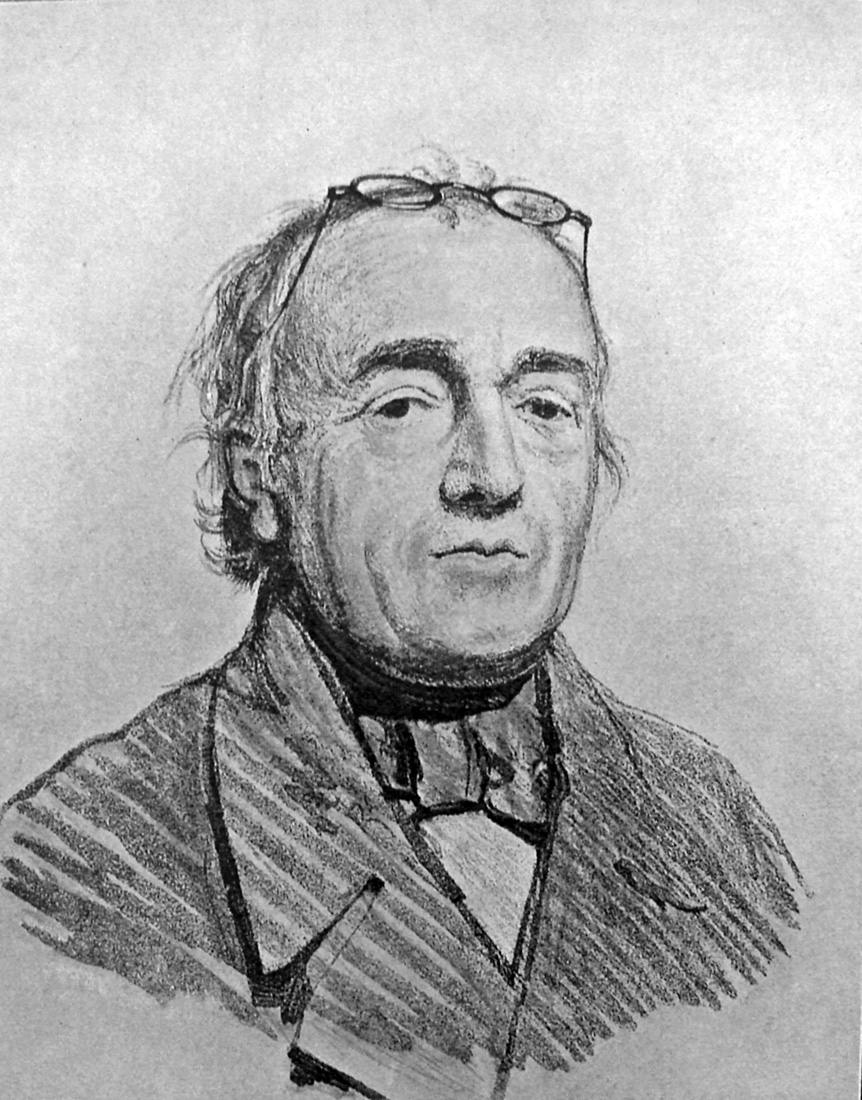 Steen Steensen Blicher (11. oktober 1782 - 26. marts 1848), dansk præst og forfatter, født i Vium præstegård.